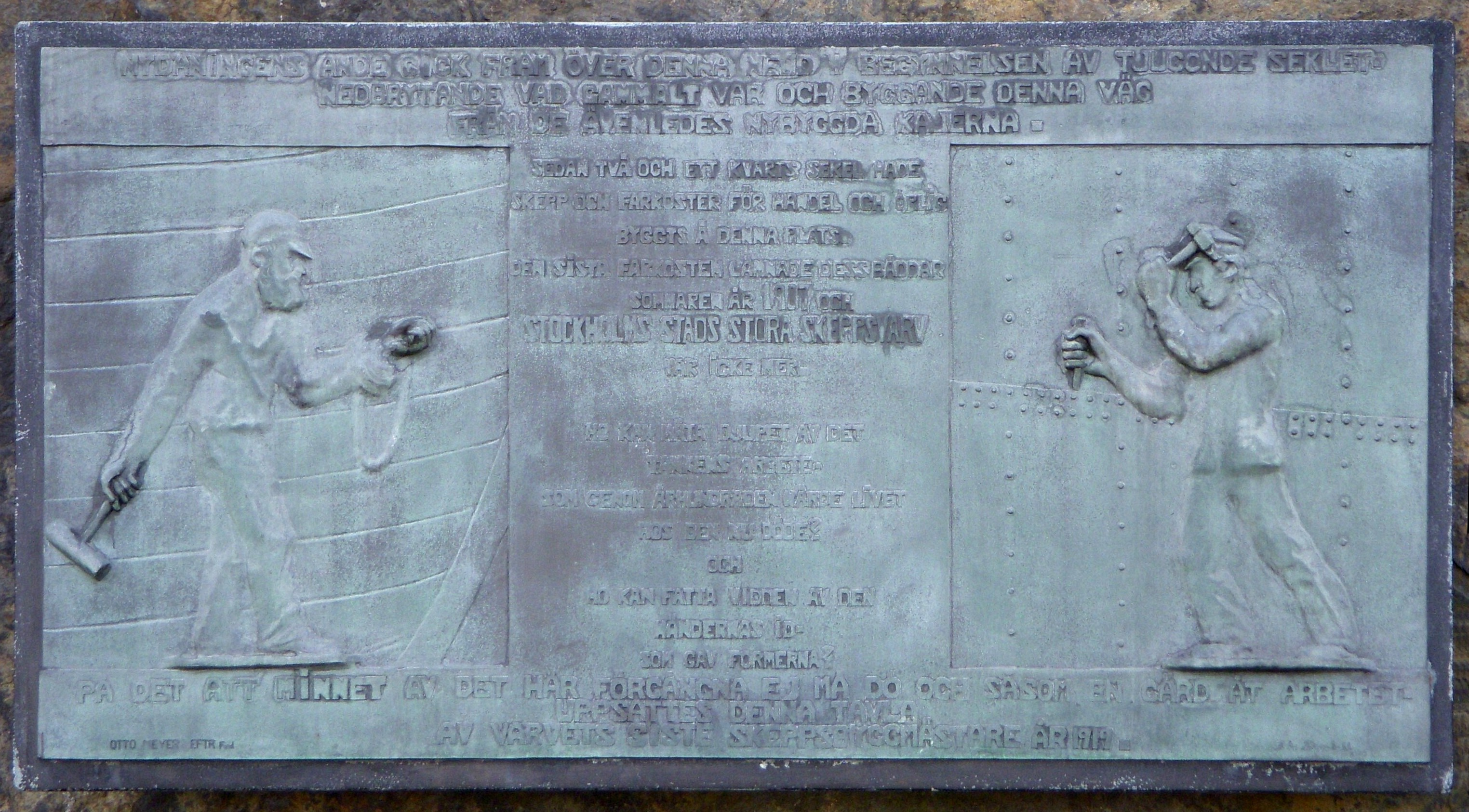 Minnestavla för "Stockholms stora varv" uppsatt vid Londonviadukten på Södermalm. Skulptör Fredrik Frisendahl. Text: Nydaningens ande gick fram över denna nejd i begynnelsen av tjugonde seklet nedbrytande vad gammalt var och byggande denna väg från de ävenledes nybyggda kajerna. Sedan två och ett kvarts sekel hade skepp och farkoster för handel och örlig byggts på denna plats. Den sista farkosten lämnade dess bäddar sommaren år 1907 och Stockholms Stora Skeppsvarv var icke mer. Ho kan mäta djupet av det tankens arbete, som genom århundraden närde livet hos den nu döde och ho kan fatta vidden av den händernas id, som gav formerna? På det att minnet av det här förgångna ej må dö och såsom en gärd åt arbetet uppsattes denna tavla av varvets siste skeppsbyggmästare år 1919.